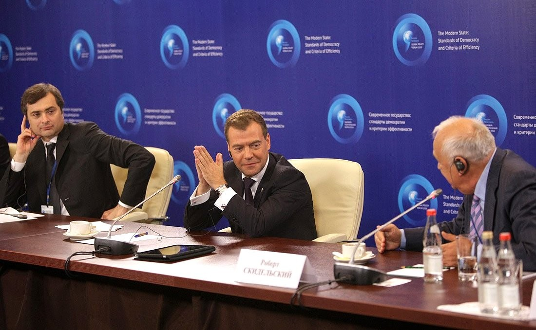 ЯРОСЛАВСКАЯ ОБЛАСТЬ, Ярославль. Дмитрий Медведев на встрече с ведущими российскими и зарубежными политологами в рамках мирового политического форума «Современное государство: стандарты демократии и критерии эффективности». С Первым заместителем Руководителя Администрации Президента Владиславом Сурковым (слева) и главой Центра глобальных исследований, профессором политической экономии Уорикского университета Робертом Скидельски.